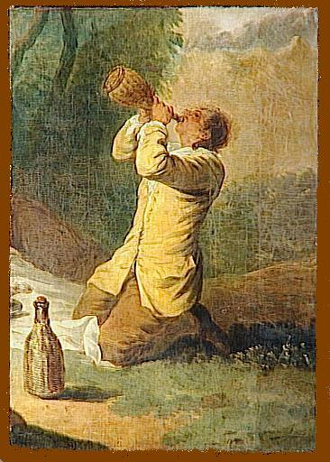 Uomo che bevetitle QS:P1476,it:"Uomo che beve" label QS:Lit,"Uomo che beve"